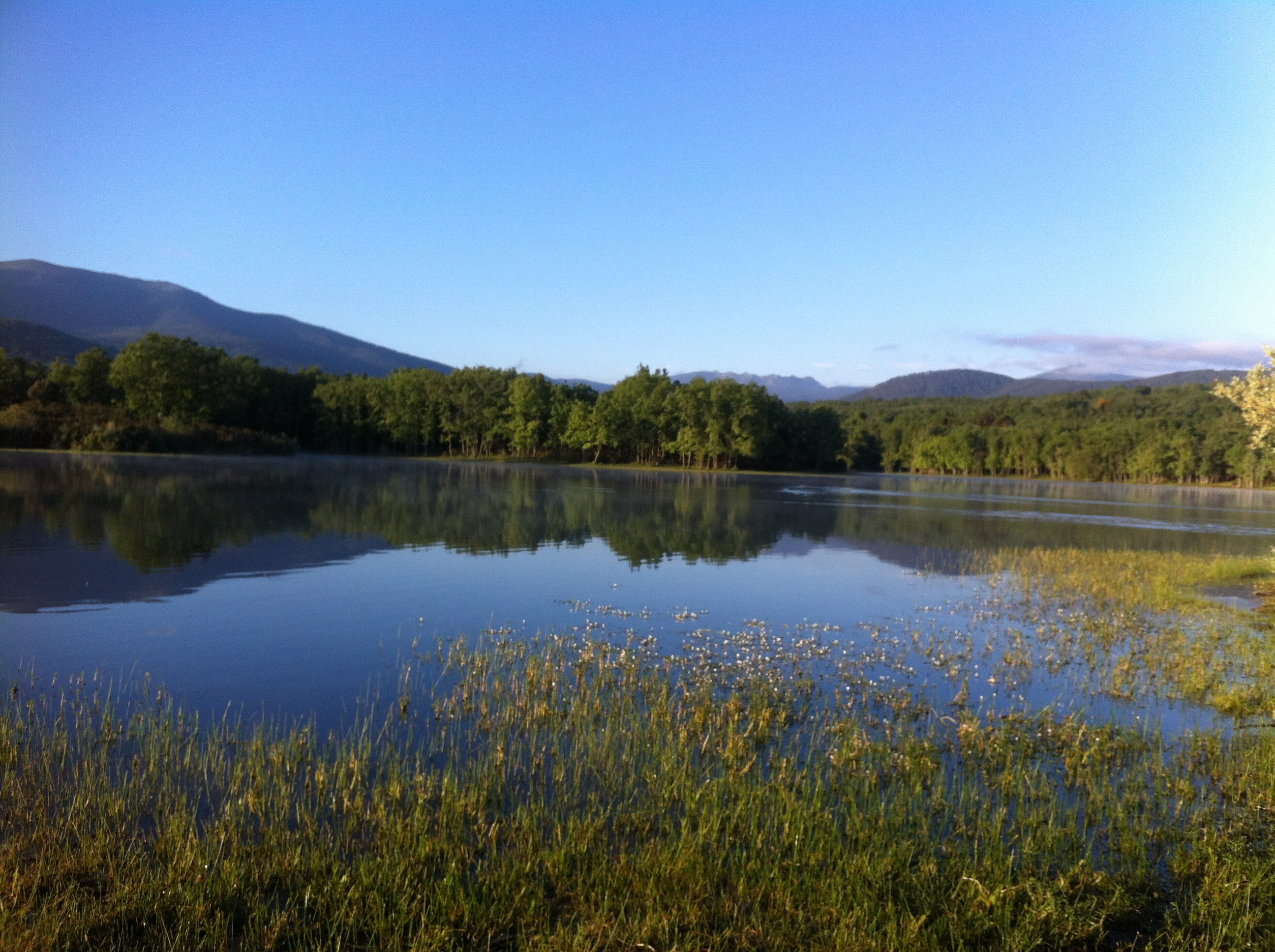 Segovia